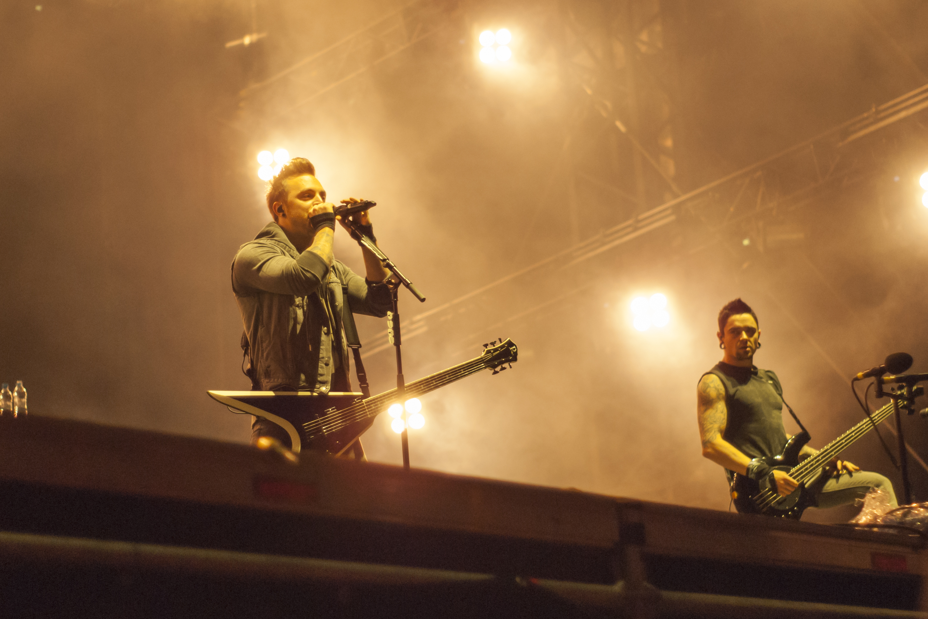 Matthew "Matt" Tuck i Jason "Jay" James podczas festiwalu Ursynalia 2013